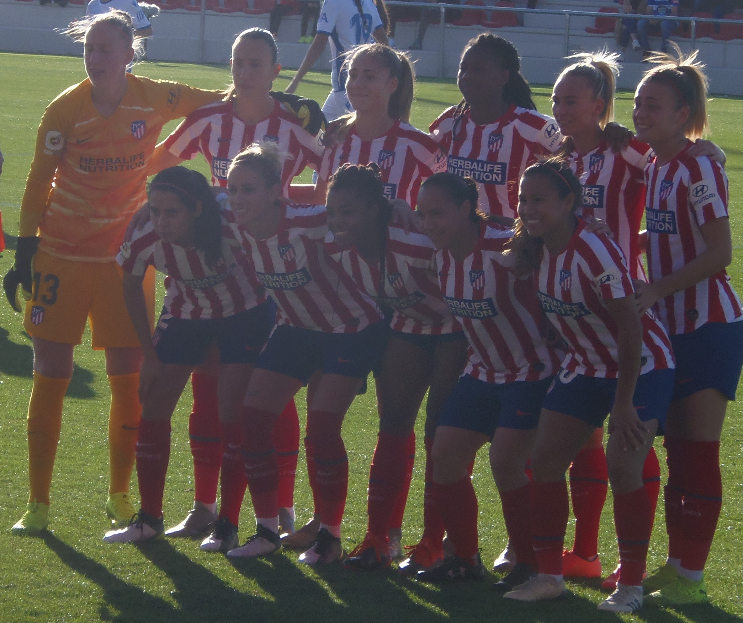 Formación inicial del Atlético de Madrid contra el Deportivo Abanca el 3 de noviembre de 2019